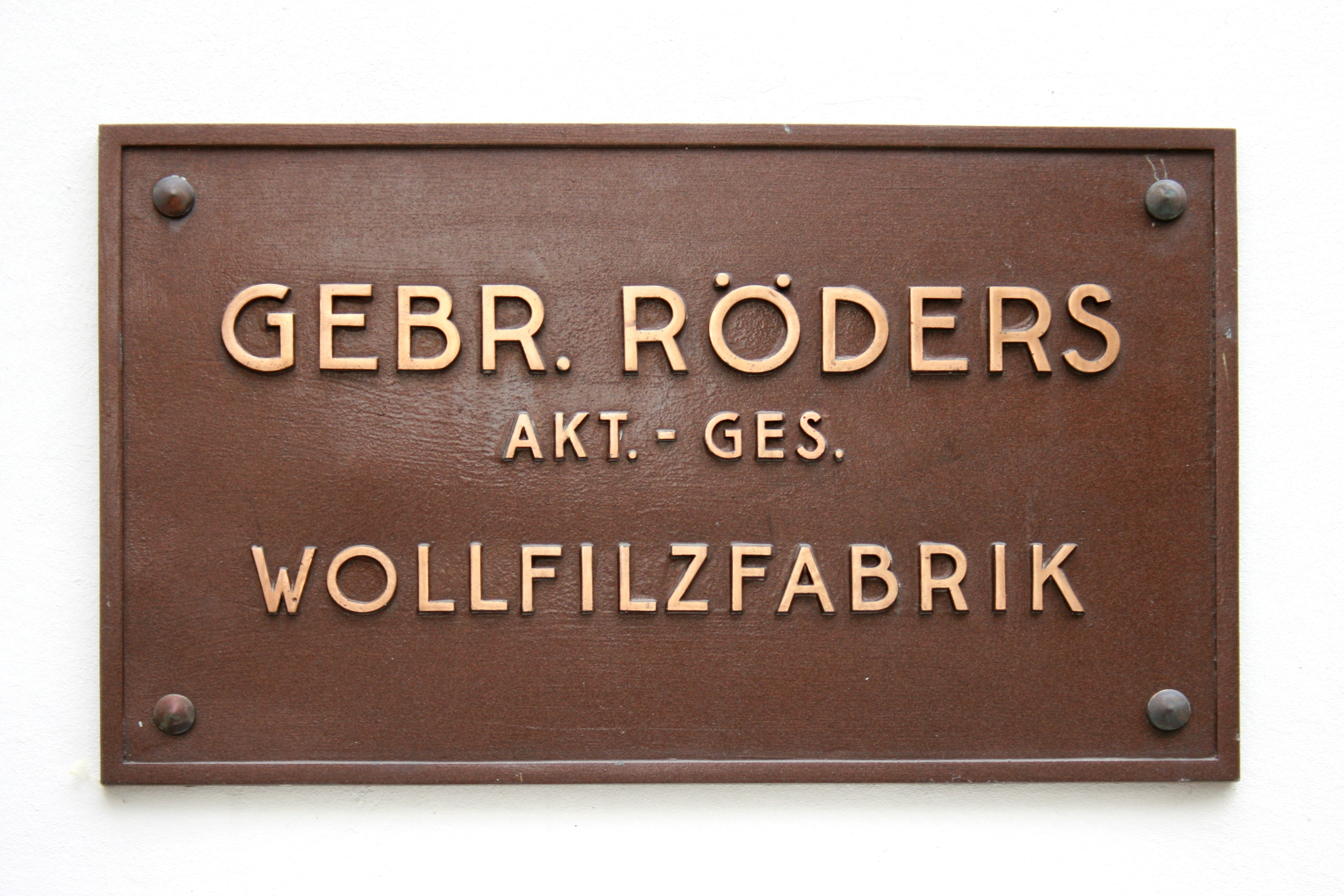 Timmermanngang in Soltau